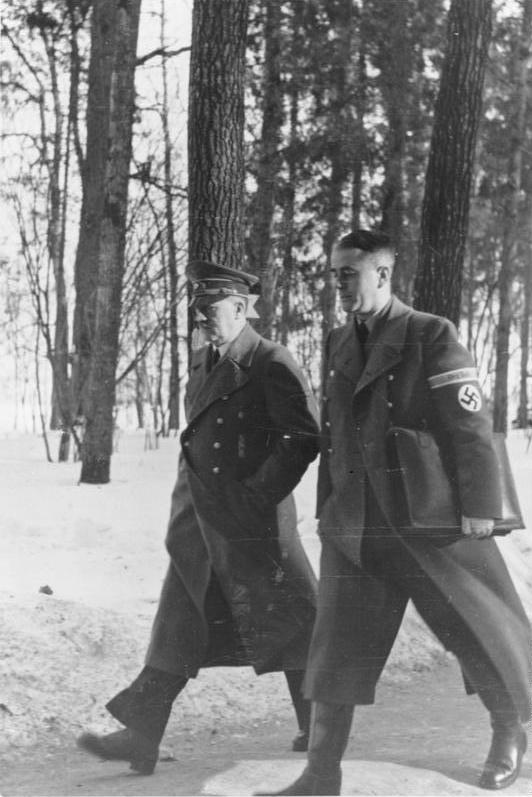 Der Führer und Reichsminister Speer bei einer Besprechung im Führerhauptquartier. 23.3.1942 [Herausgabedatum], Presse Hoffmann Freigegeben Adjutantur des Führers